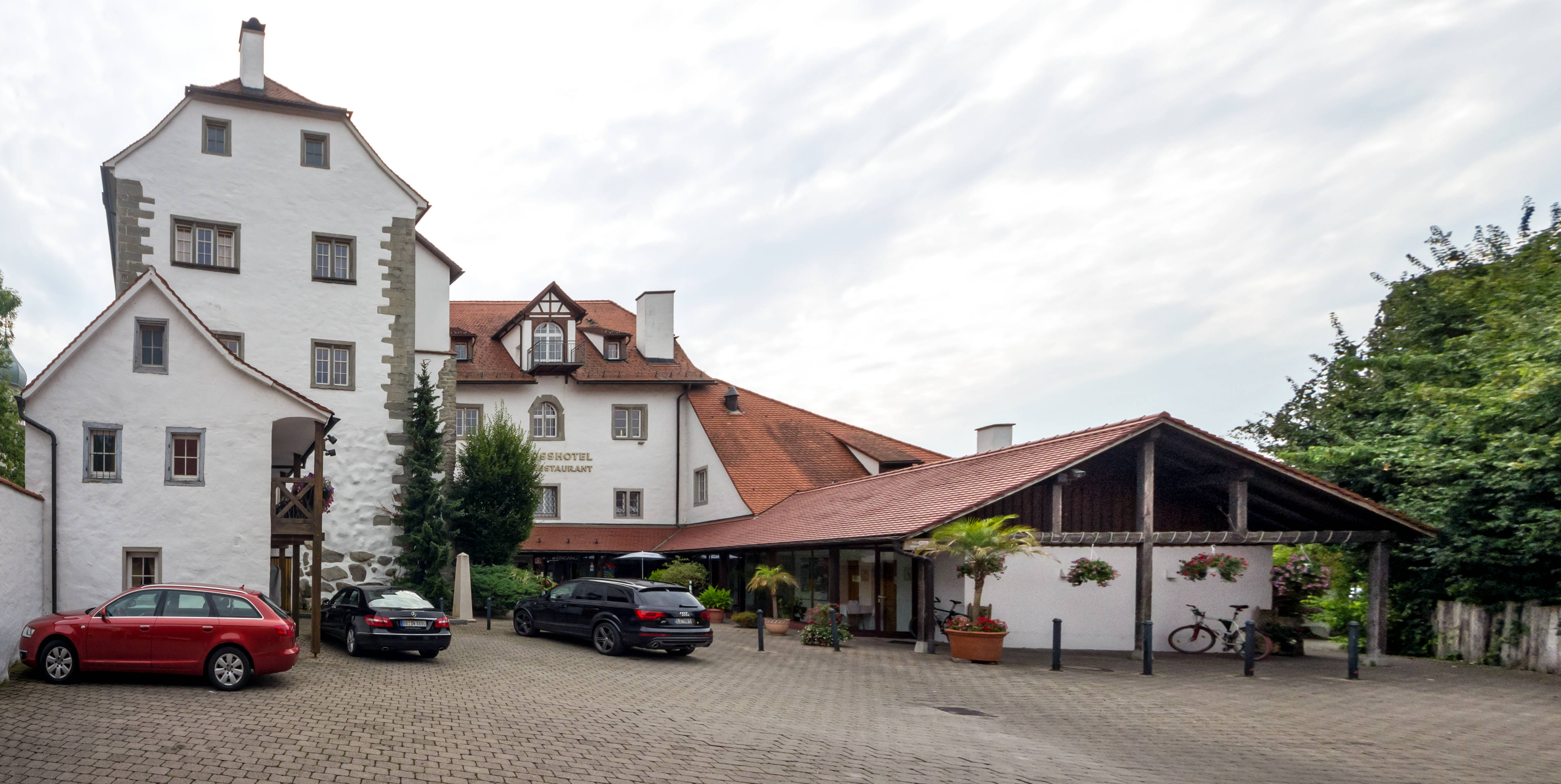 Bilder aus Wasserburg am Bodensee. Schloß Wasserburg